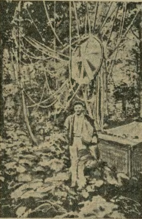 Podczas XXI Gordon Bennett Cup w 1933 roku polski balon Kościuszko, który wygrał zawody wylądował w kanadyjskiej puszczy. Obok balonu stoi porucznik Zbigniew Burzyński.